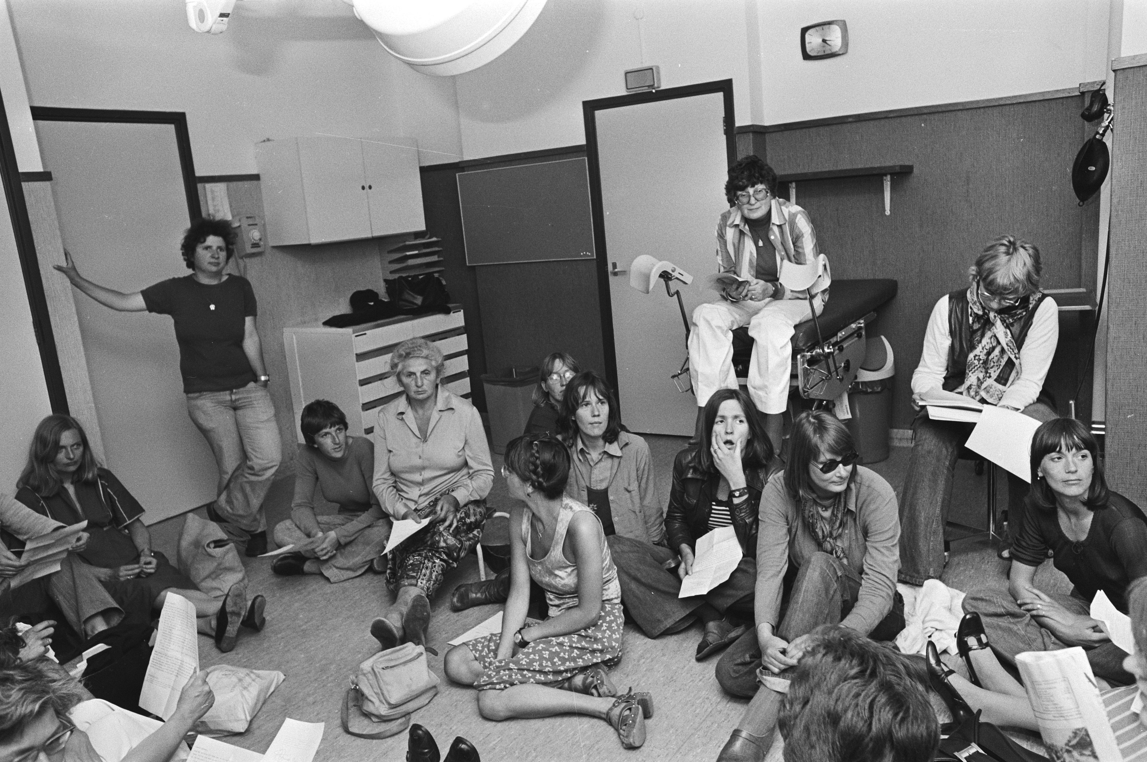 Collectie / Archief : Fotocollectie Anefo Reportage / Serie : [ onbekend ] Beschrijving : Aktievoerders bij Bloemenhovenkliniek in verband met sluiting, vrouwen hebben behandelkamer bezet Datum : 24 mei 1976 Trefwoorden : Sluitingen, abortussen, aktiegroepen, bezetting, klinieken, vrouwen Persoonsnaam : Bloemenhovenkliniek Fotograaf : Peters, Hans / Anefo Auteursrechthebbende : Nationaal Archief Materiaalsoort : Negatief (zwart/wit) Nummer archiefinventaris : bekijk toegang 2.24.01.05 Bestanddeelnummer : 928-6017